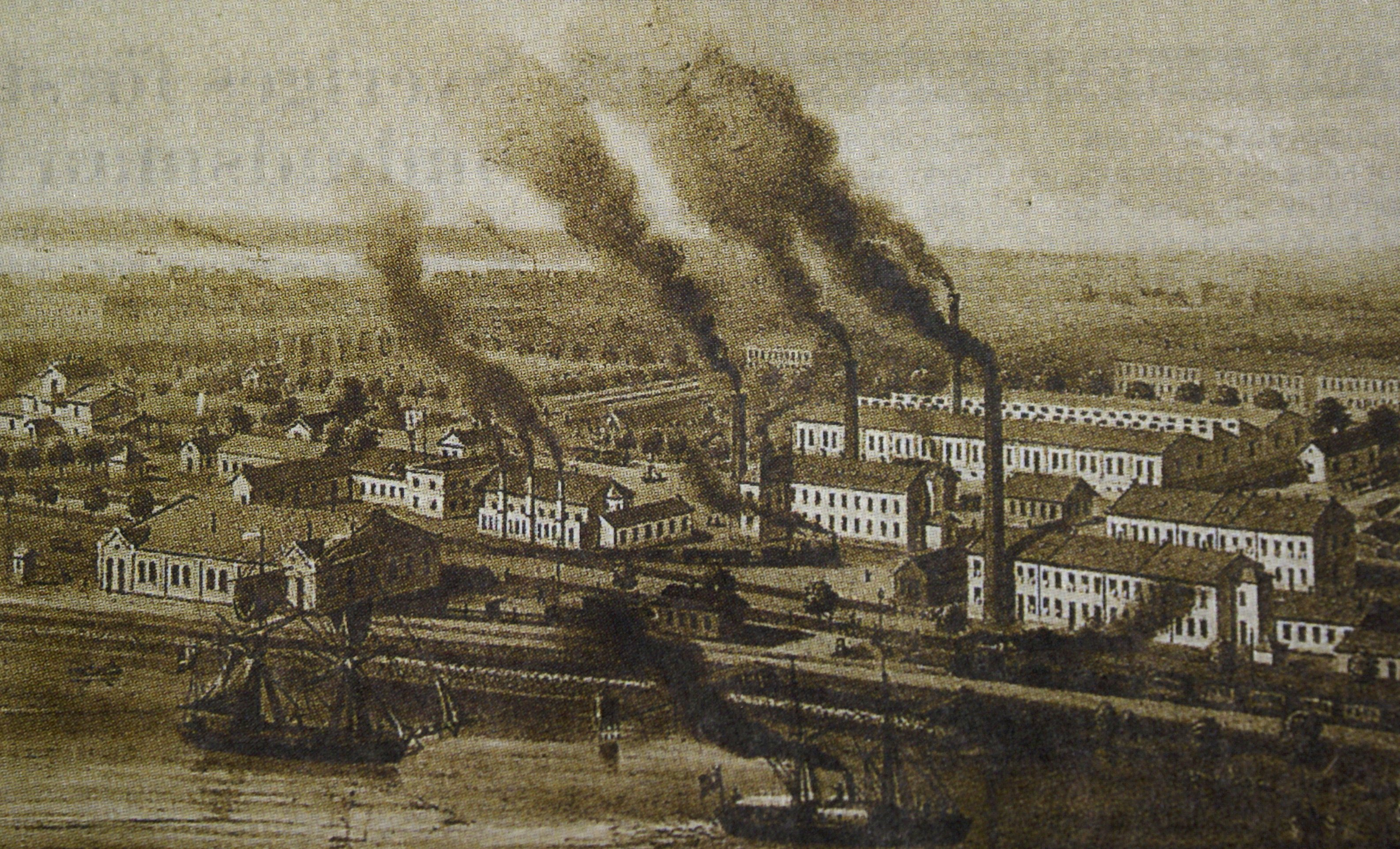 Jönköping Tändsticksfabriks AB, lithography from 1872.